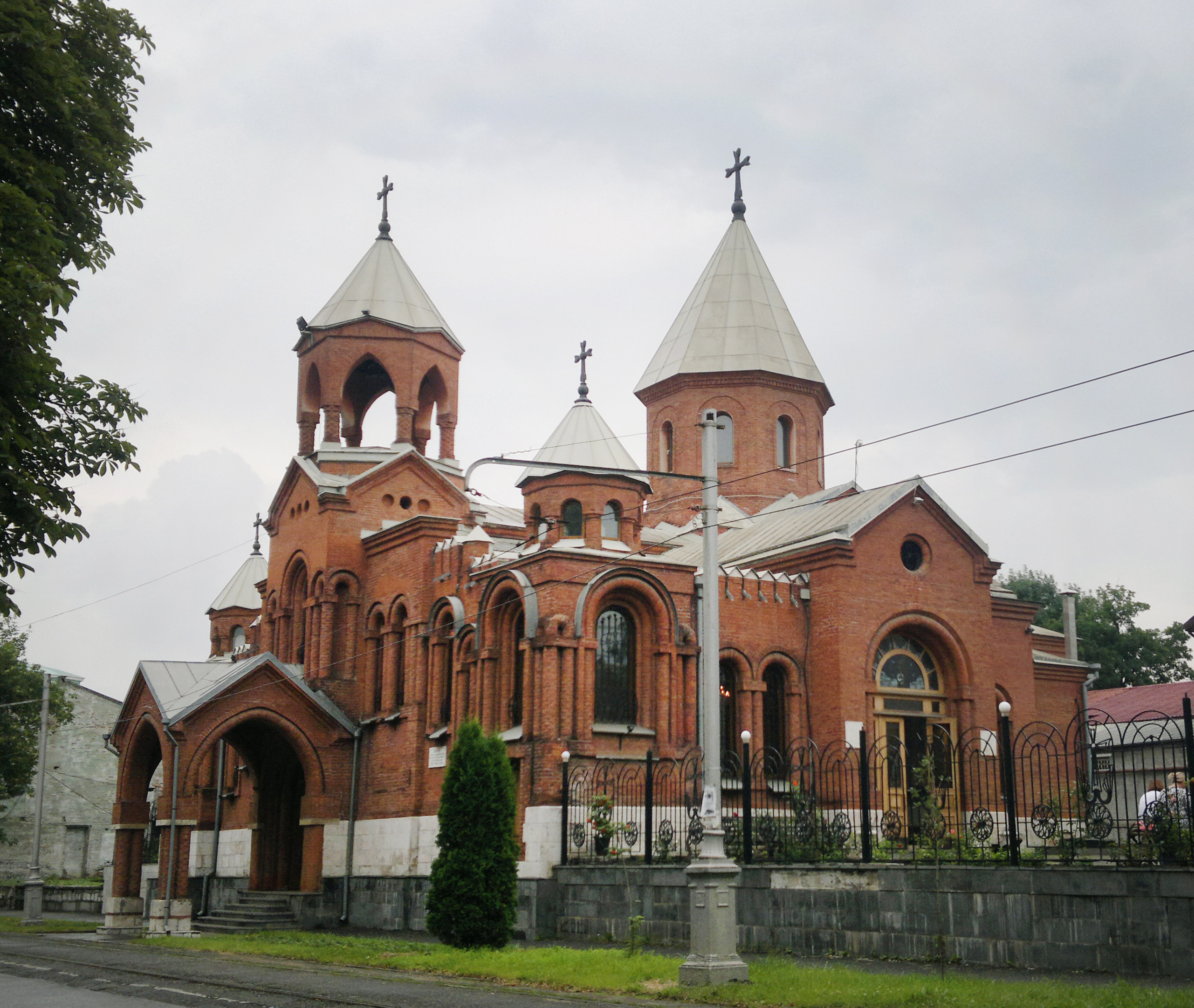 Церковь Григория Просветителя